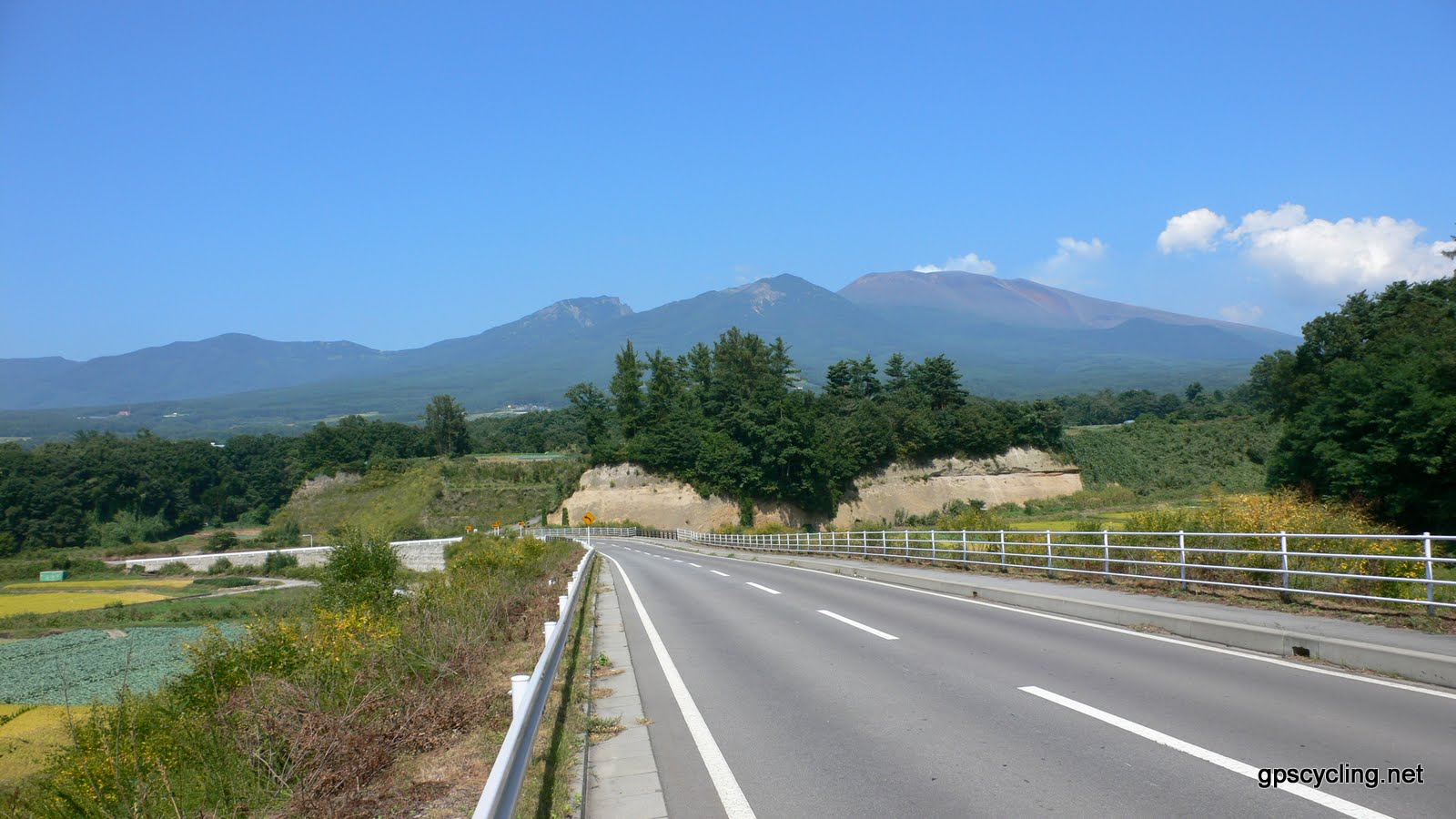 県道134号線